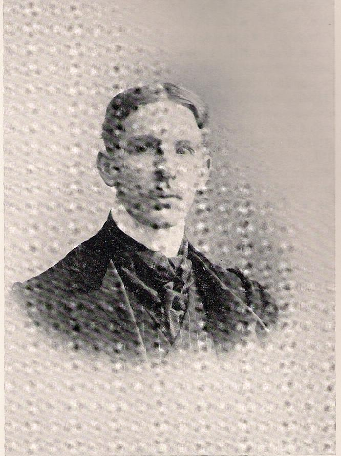 Karel de Nerée tot Babberich, Portret ca 1900